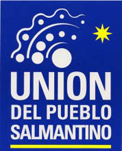 Logotipo del partido político Unión del Pueblo Salmantino